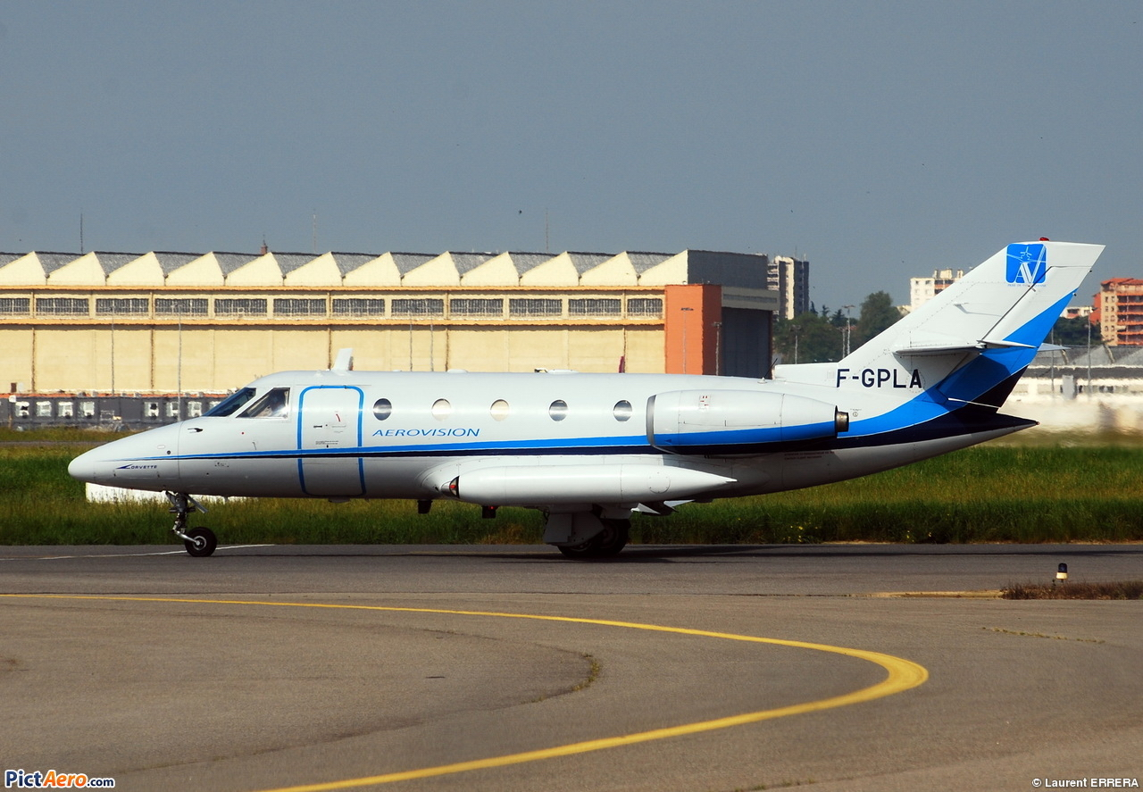 Photo prise à l'aéroport de Toulouse-Blagnac (LFBO) en France. Picture take at Toulouse-Blagnac Airport (LFBO) in France.